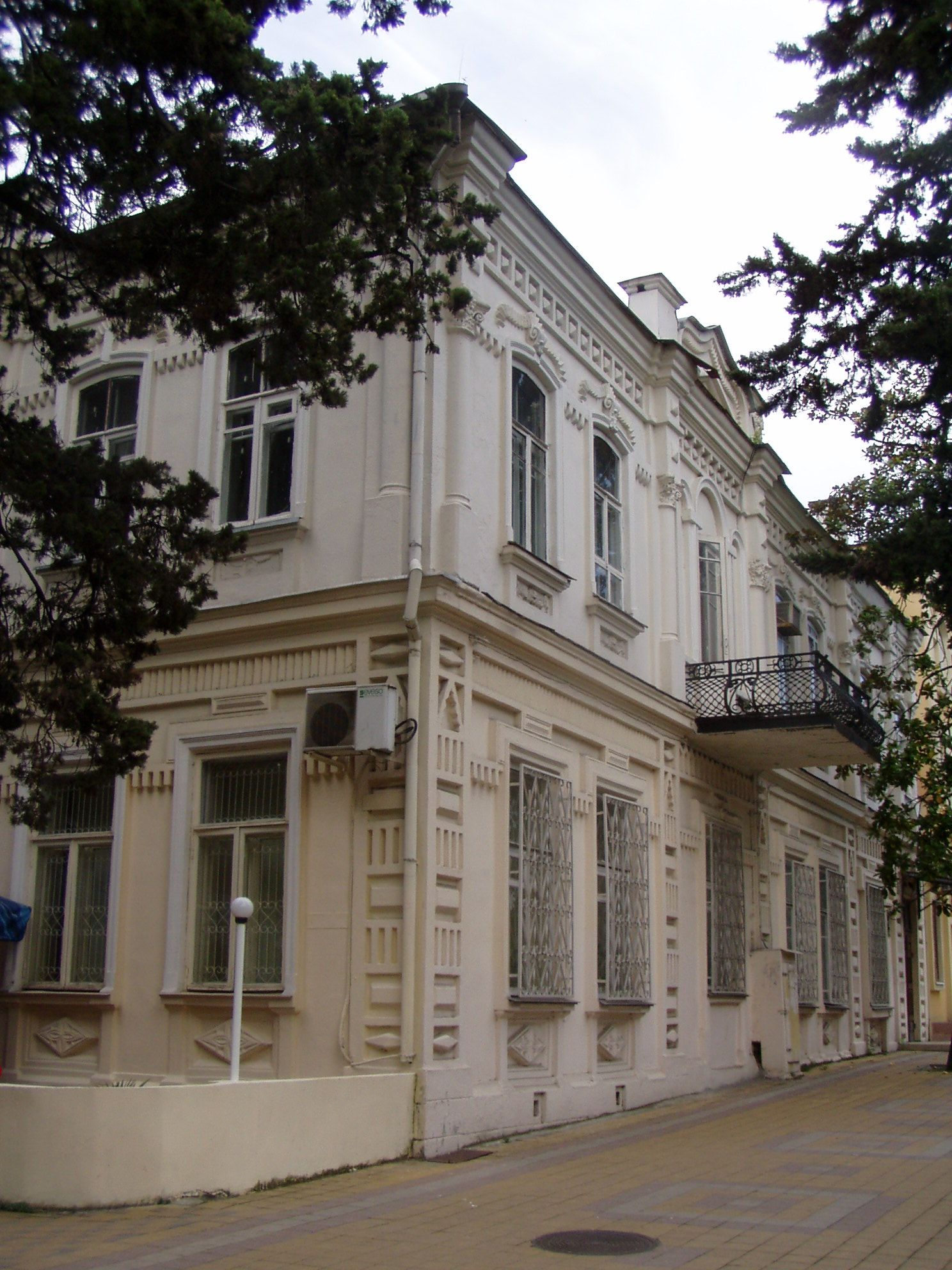 Здание дореволюционной постройки в центре Сочи